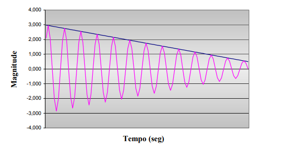 grafico magnitudde